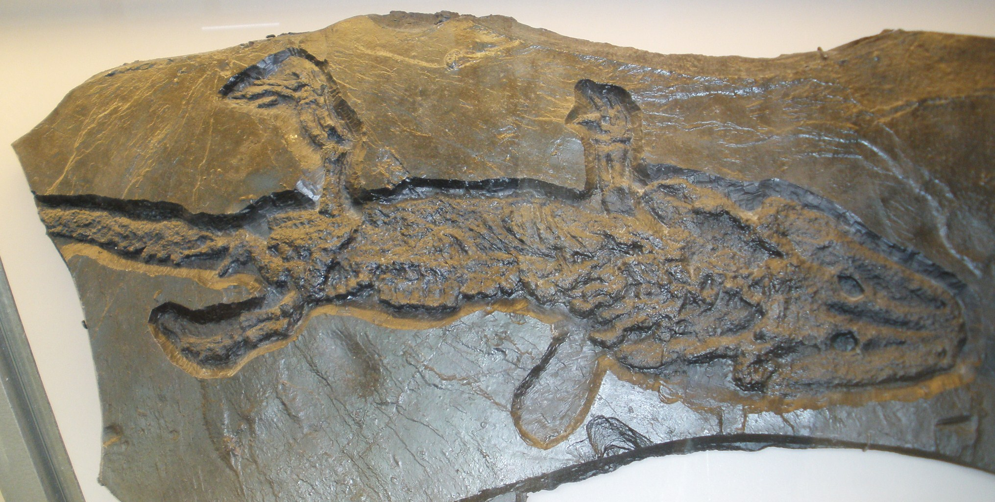 Fossil of "Onchiodon", an extinct amphibian Took the photo at Musee d'Histoire Naturelle, Brussels